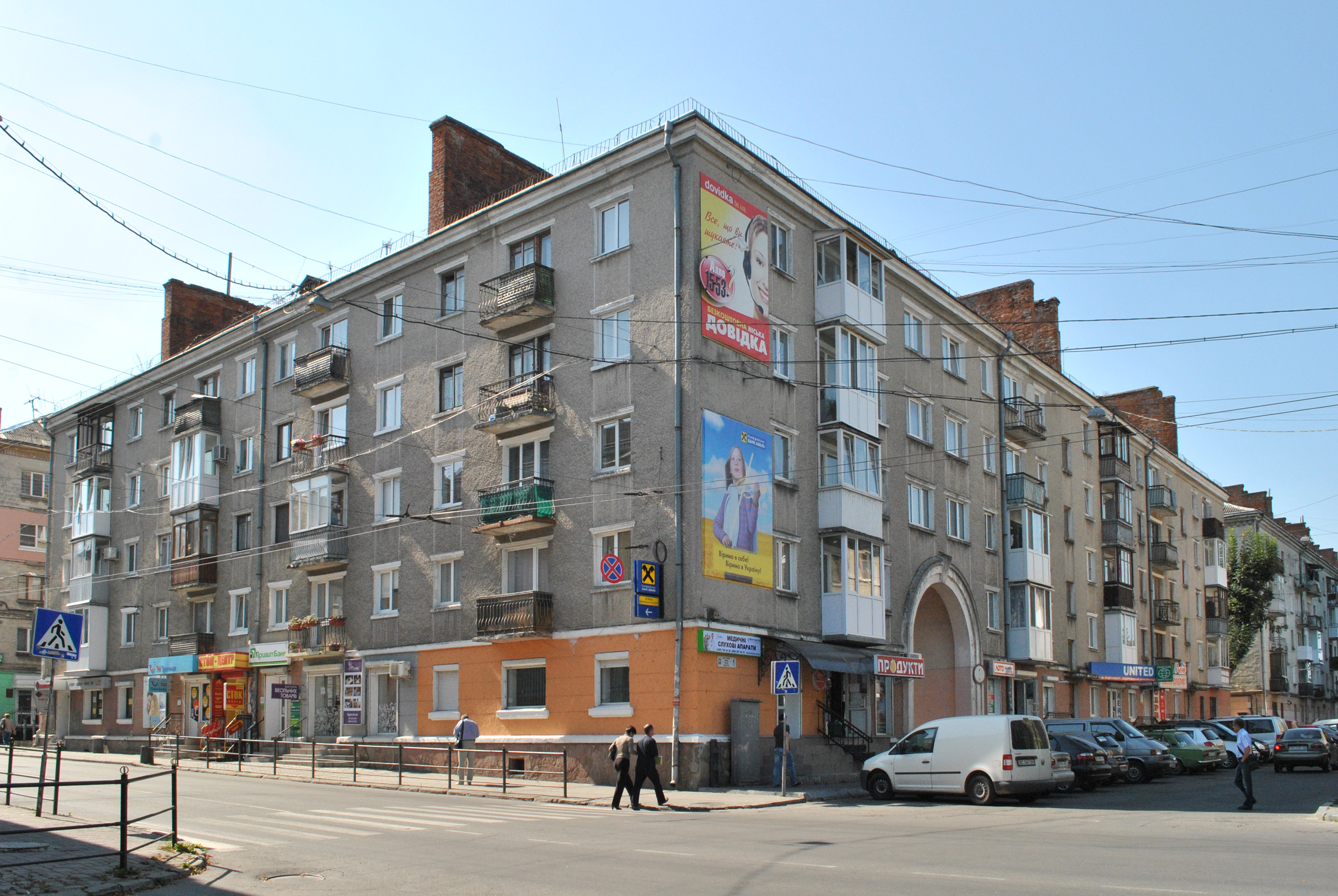 Житловий будинок (мур.) на вул. Старий ринок, 1 у Тернополі.